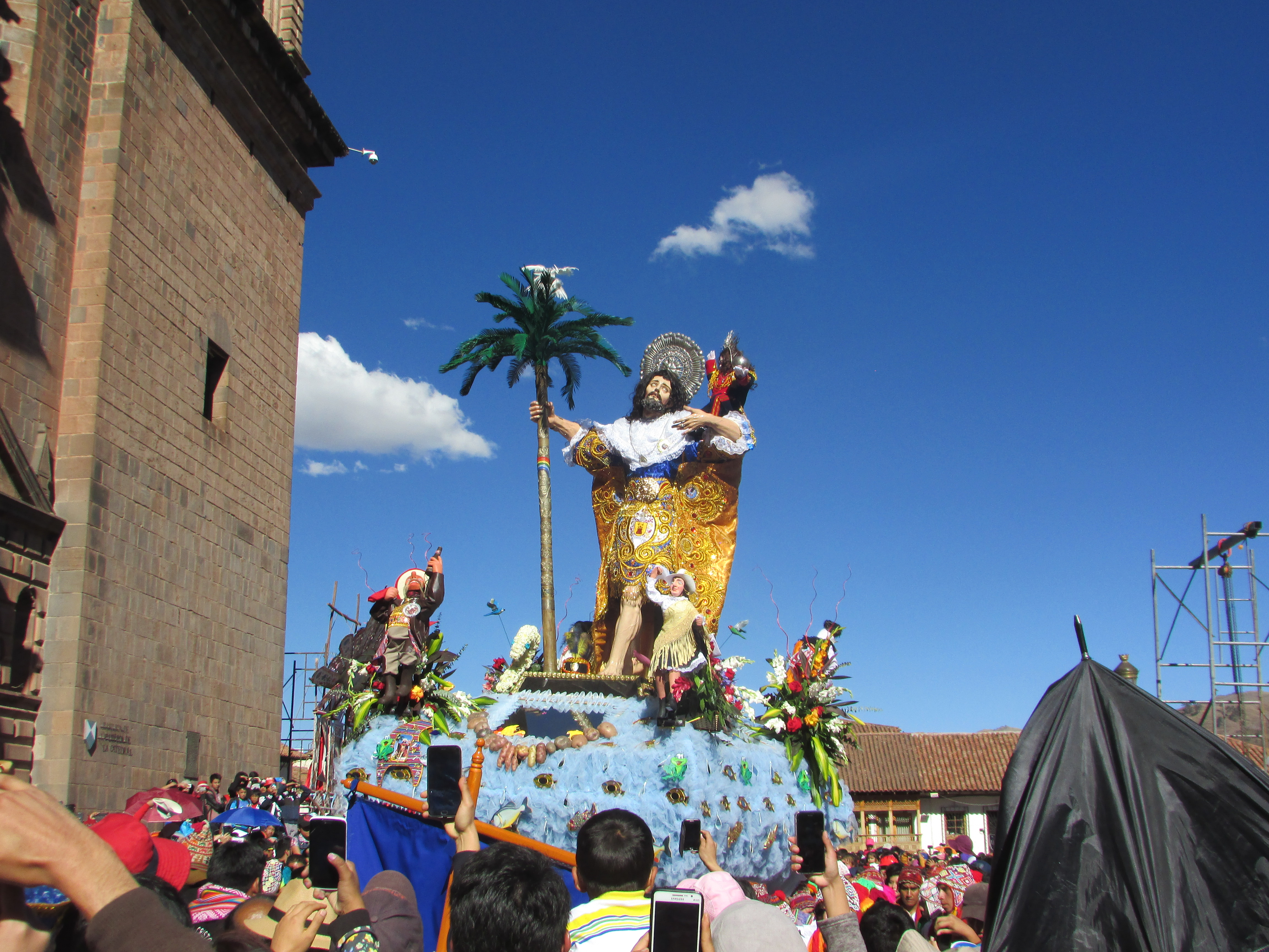 San Cristóbal de la parroquia de San Cristóbal